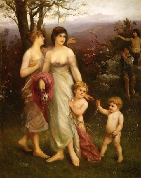 Der Frühling